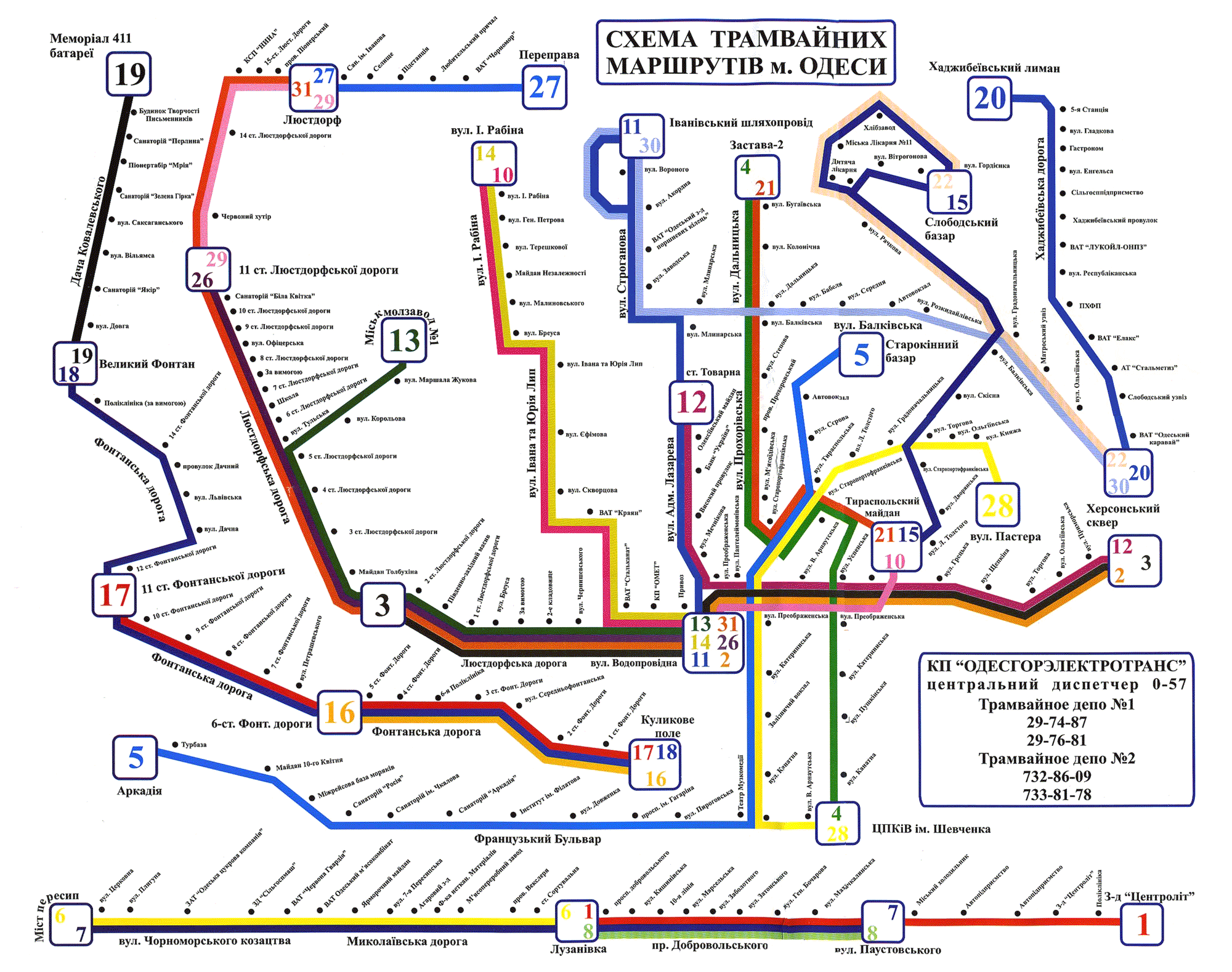 Schéma assez imprécis du réseau de Tramway d'Odessa en 2013.